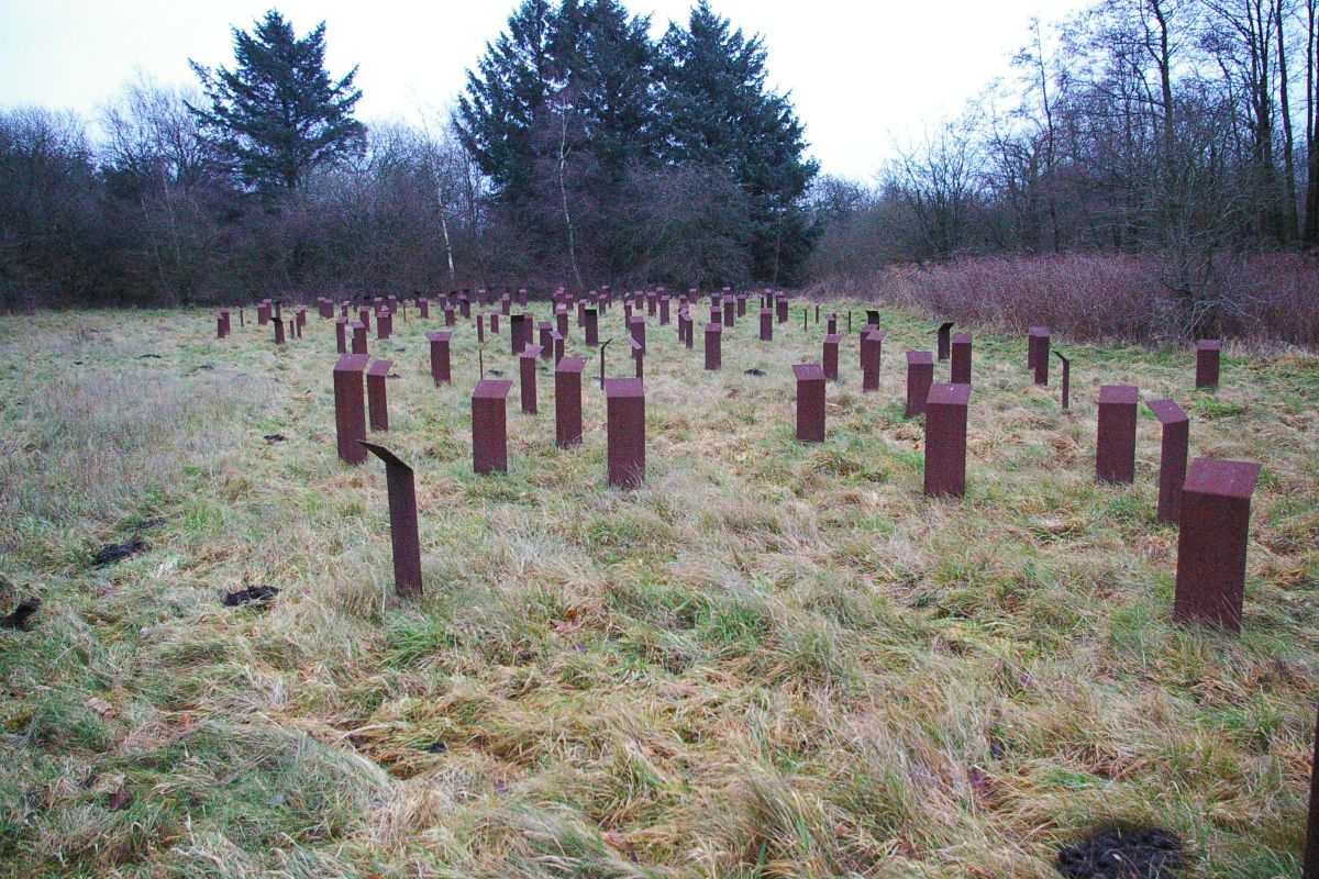 Gedenkstätte KZ Husum-Schwesing